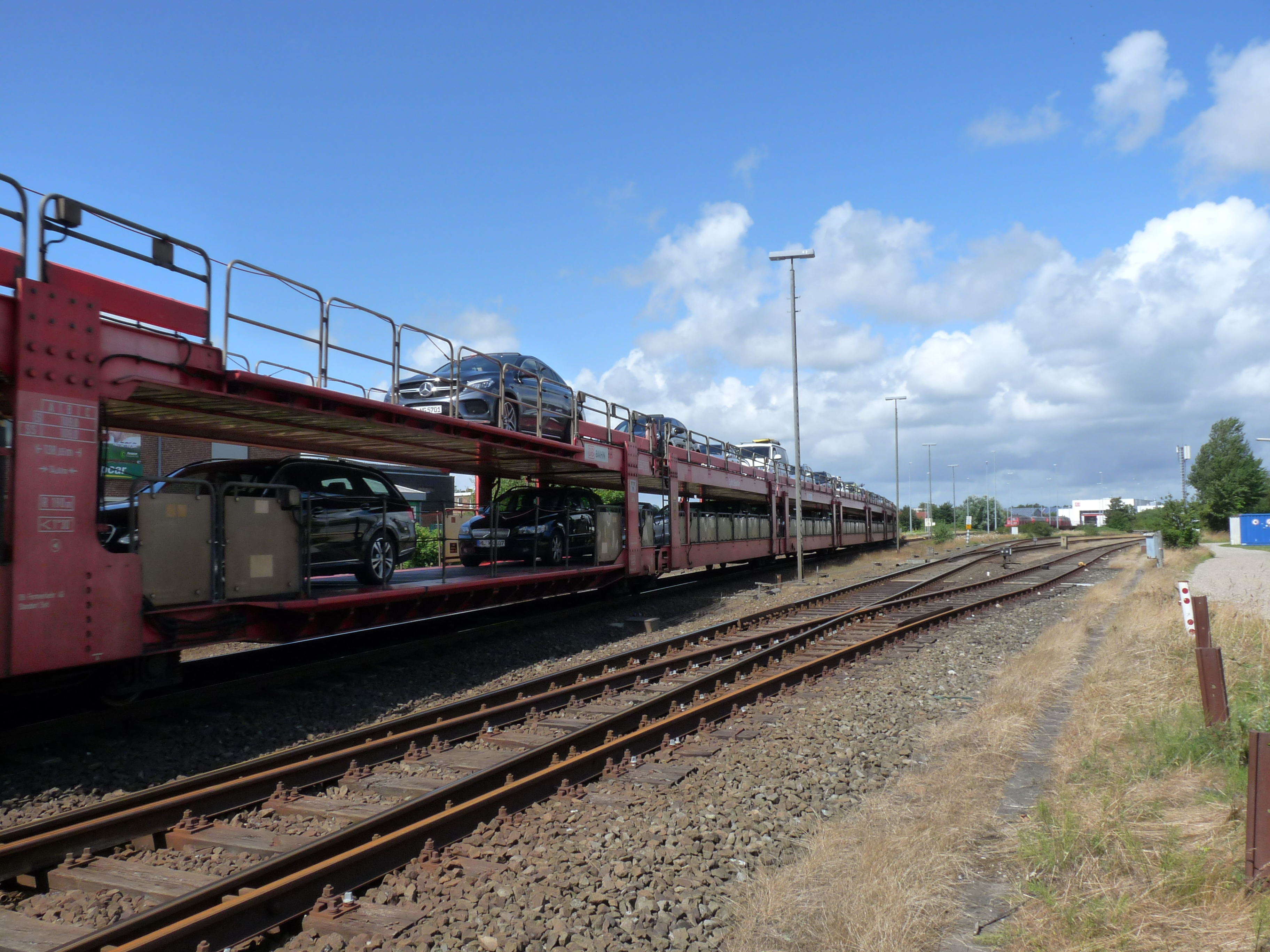 Autotrein Sylt